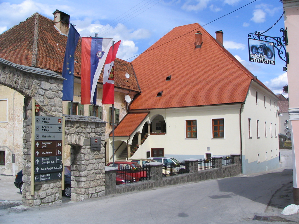 Stavba nekdanjega škofijskega dvorca oz. graščina, v kateri danes delujeta Urad občine Vitanje in Knjižnica Vitanje.